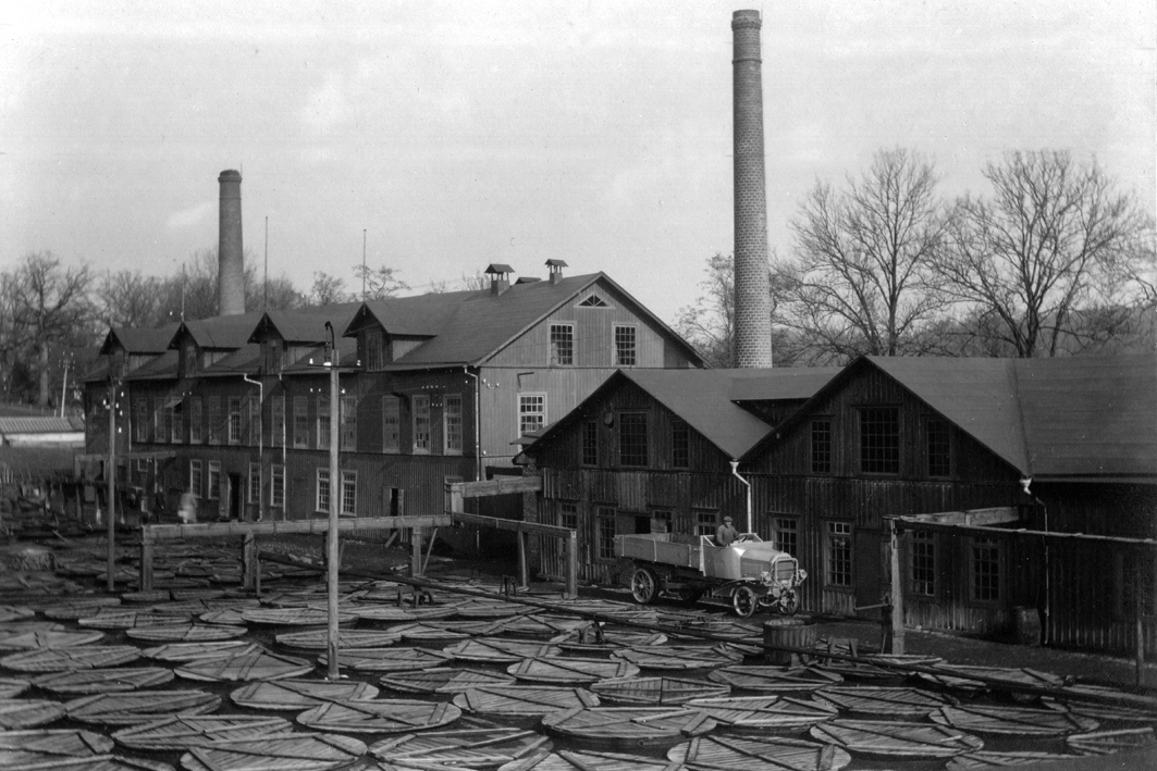 Fabriksbyggnad för lädertillverkning i södra Sverige